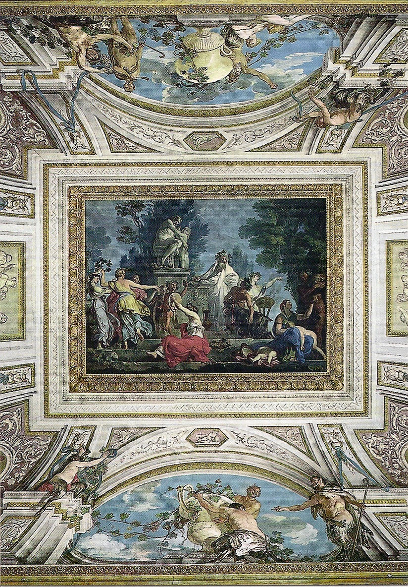 detail